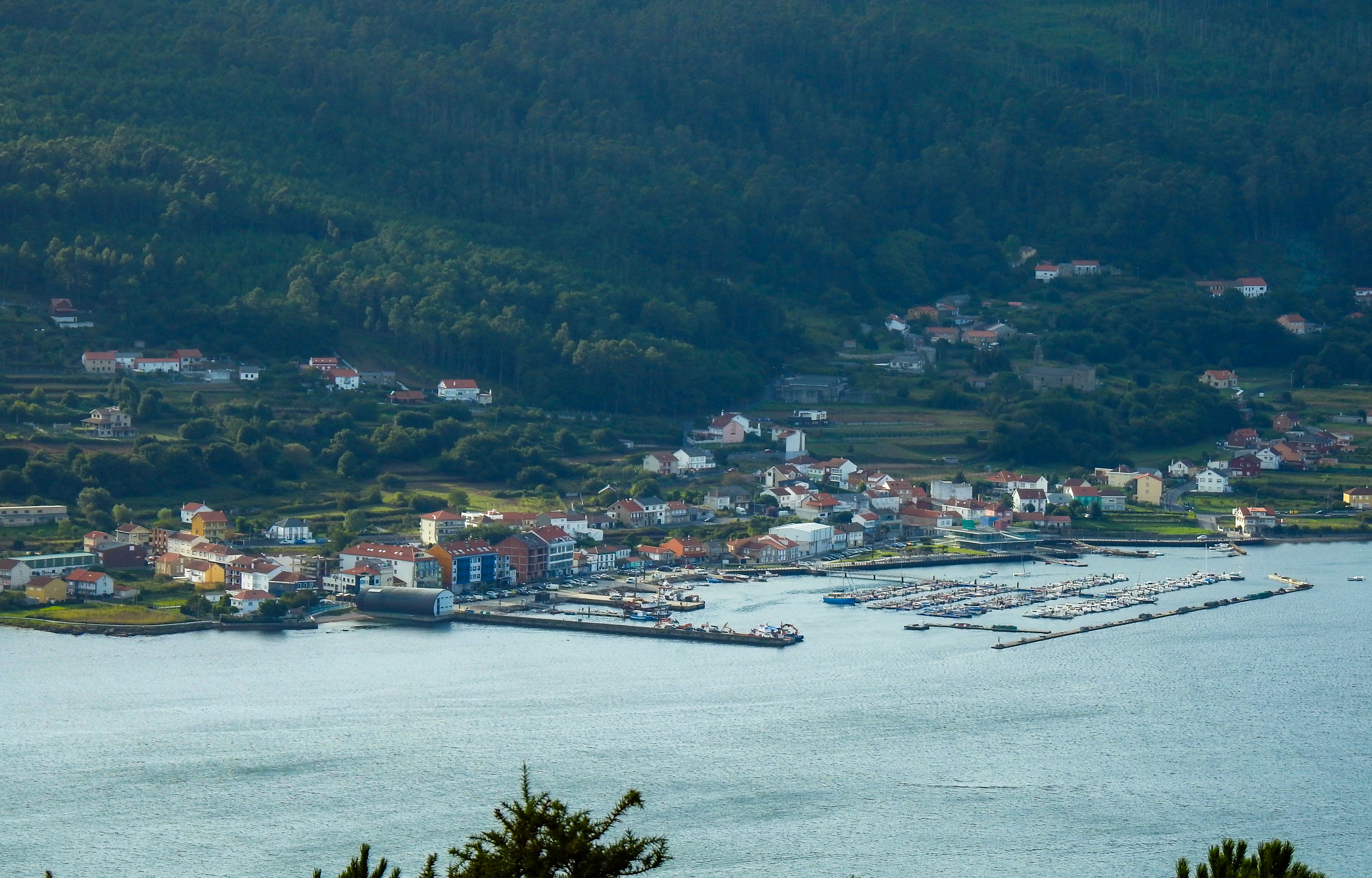 Ribeira do Freixo, vila do concello de Outes. Foto dende o San Lois